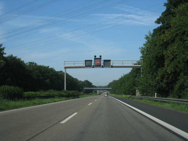 A4 zwischen Arnoldsweiler und Birkesdorf